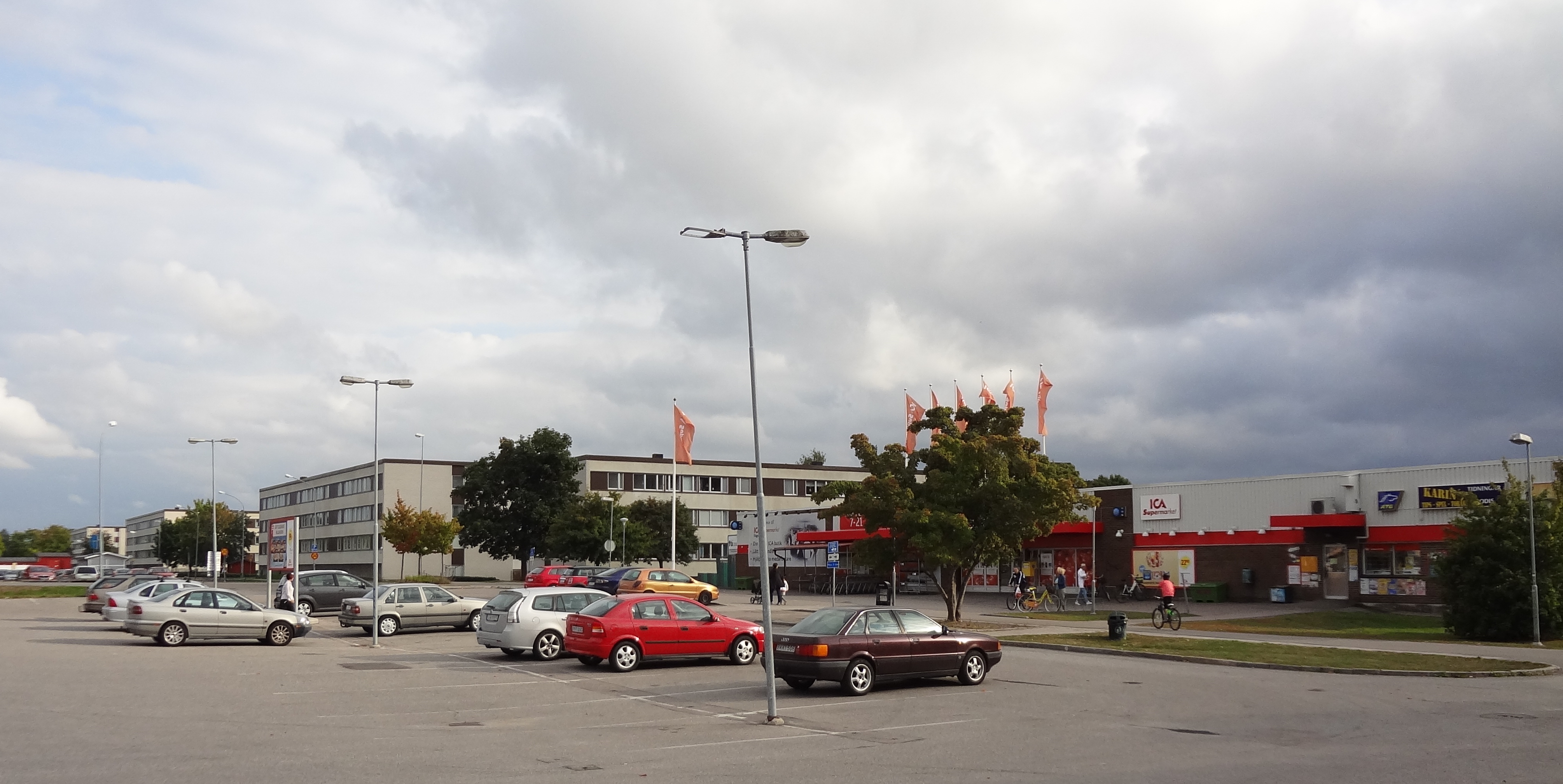 Centrala Slagsta i Eskilstuna med butiken och bebyggelse längst Brusengatan.